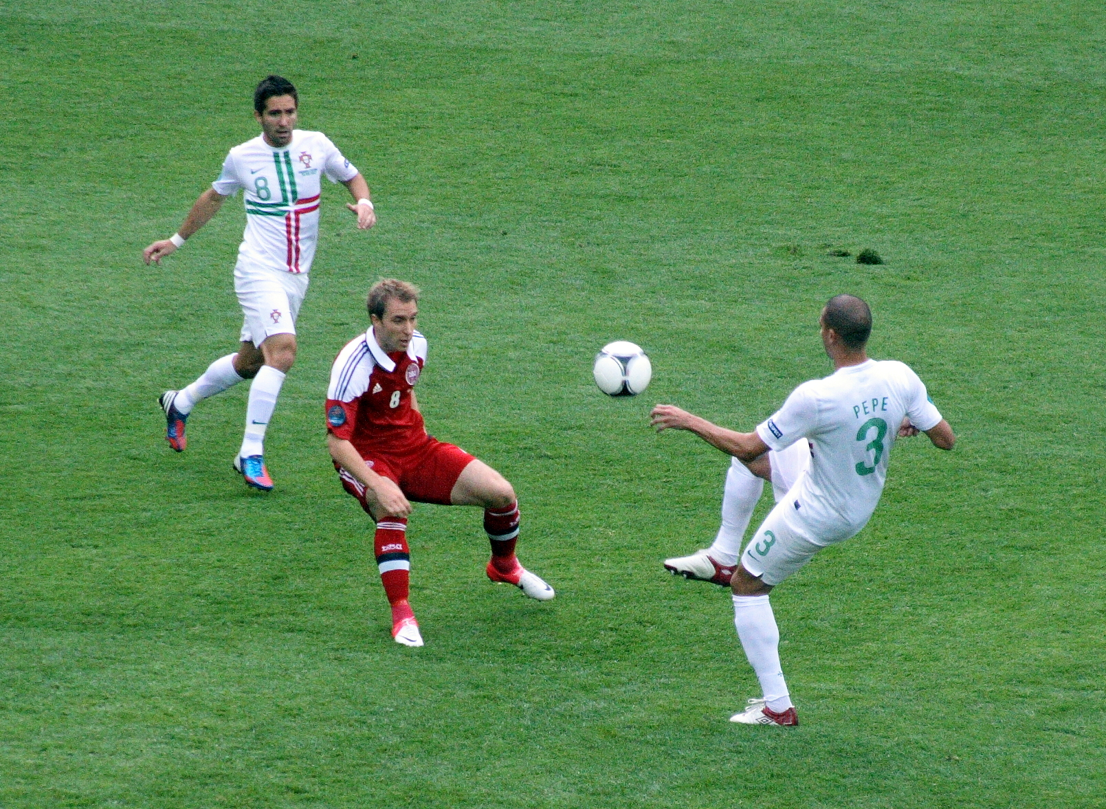 Футболисты Кристиан Эриксен, Жуао Мутиньо и Пепе на Евро-2012 на матче Дания-Португалия